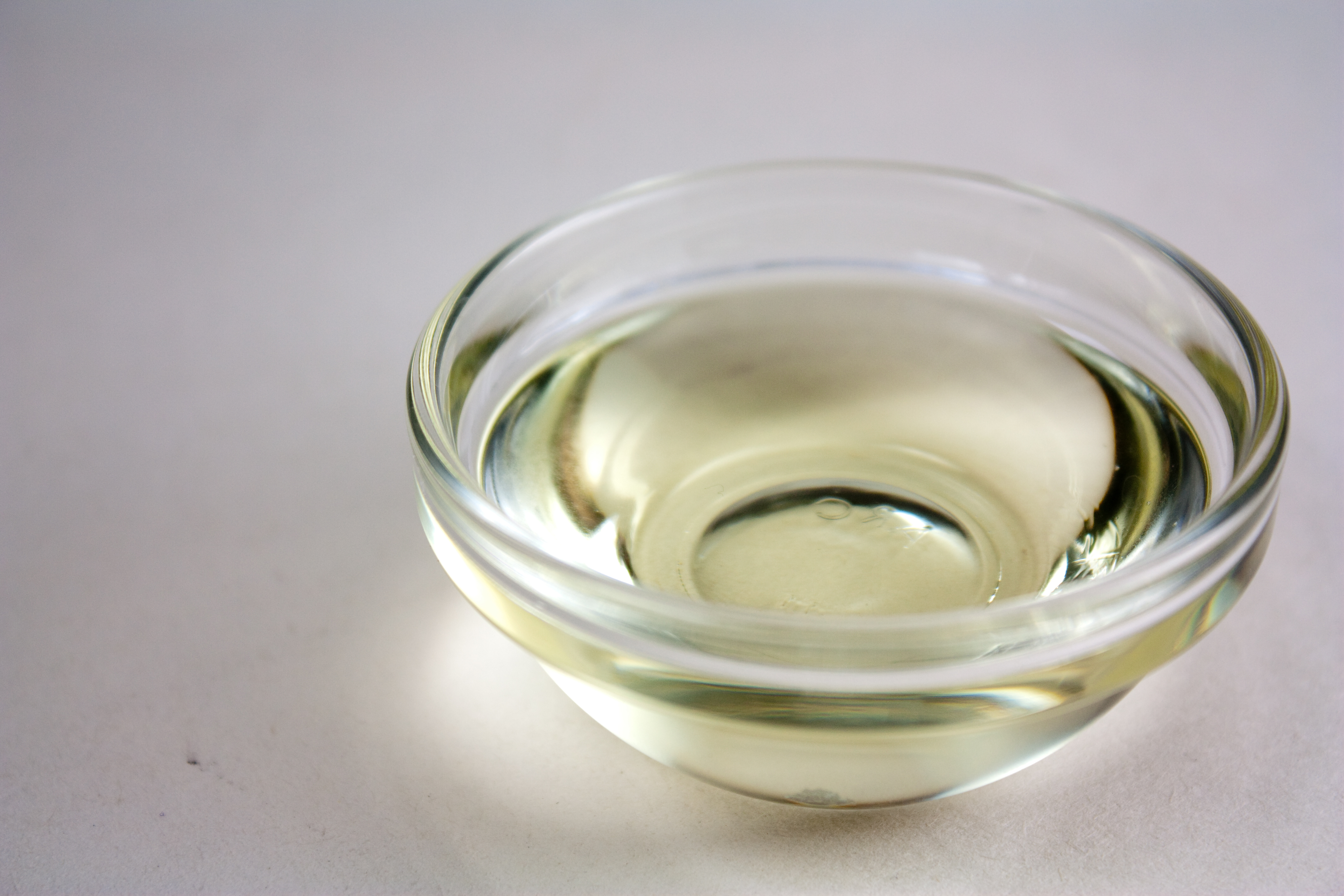 Canola Oil